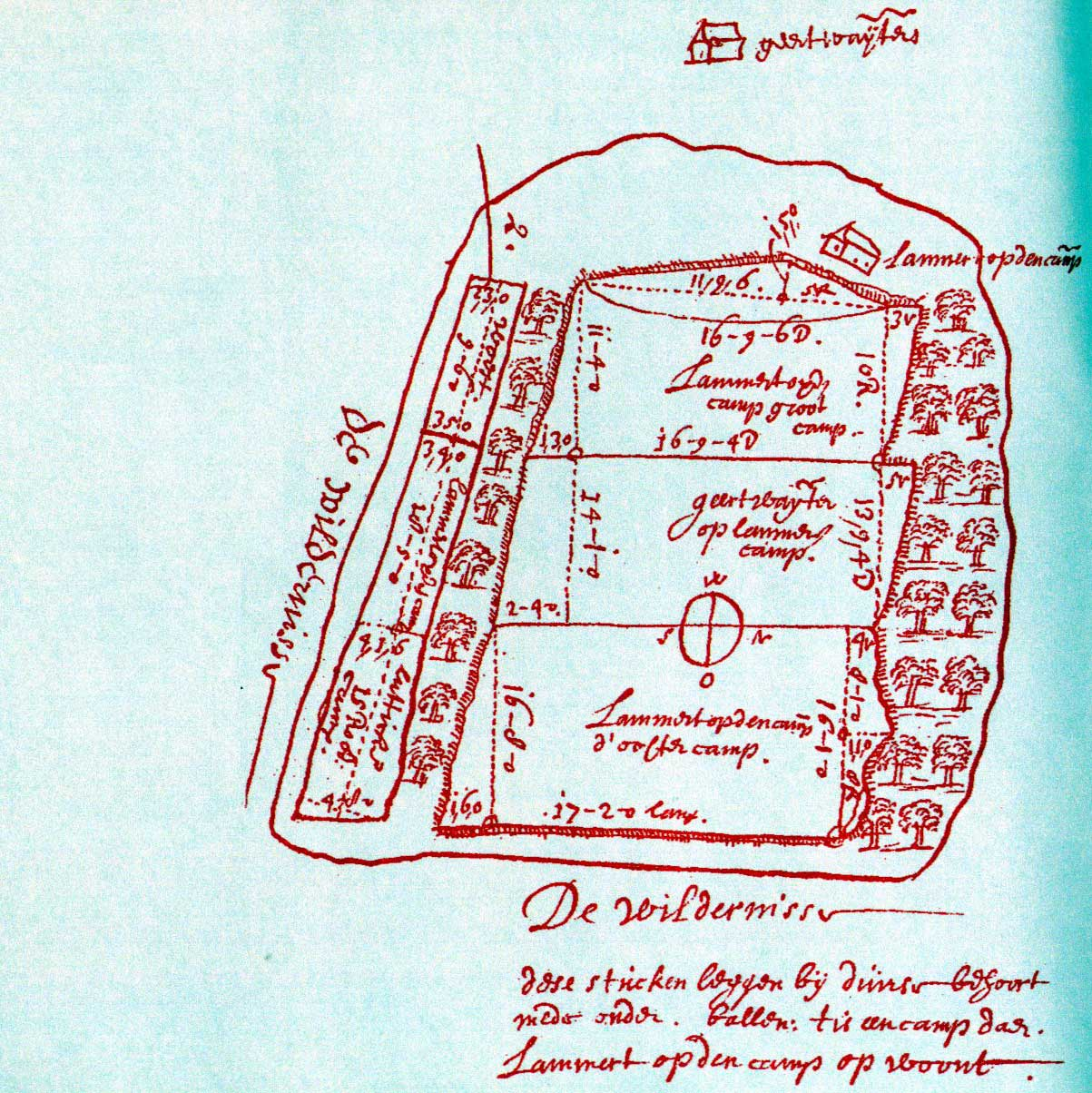 kaartje bij het grondschattinsregister 1642-1654